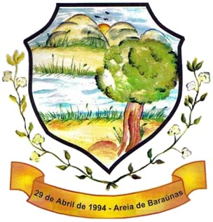 Brasão do município de Areia de Baraúnas na Paraíba